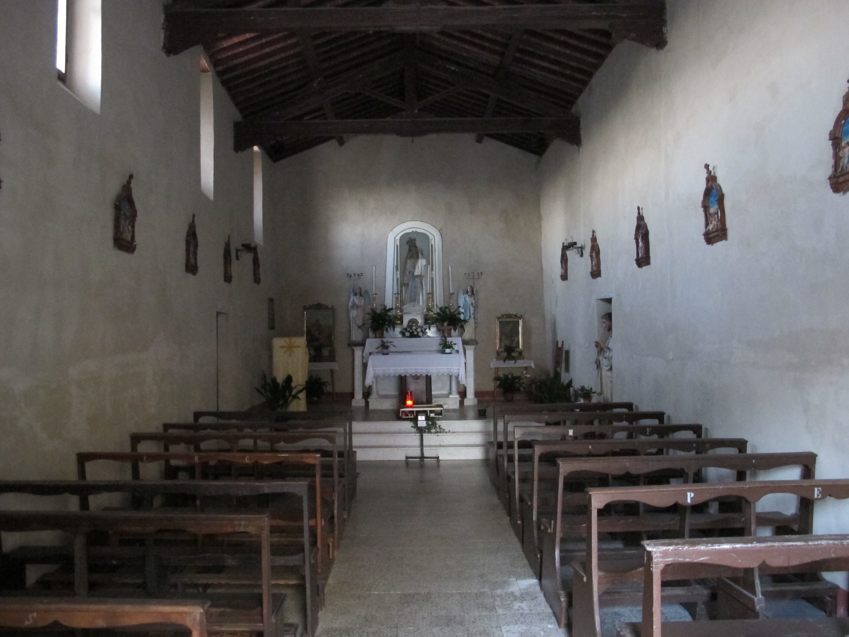 Roccalbegna, madonna del soccorso 02 interno